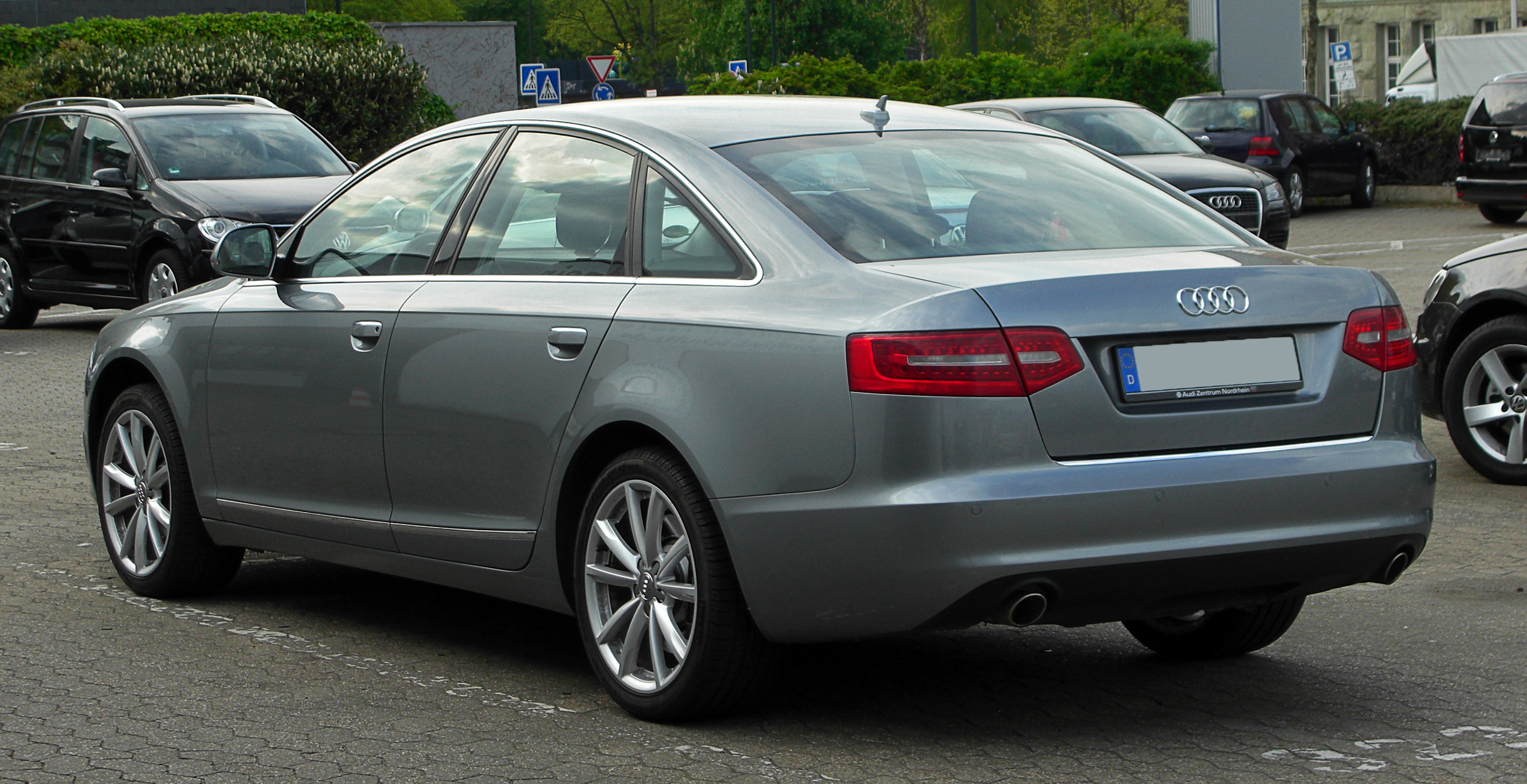 Audi A6 (C6, Facelift)